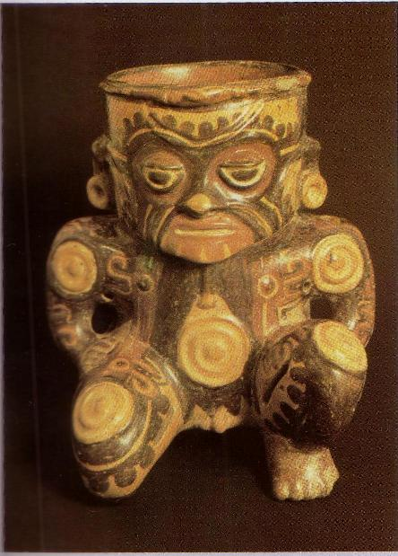 Cerámica de Guanacaste, periodo Policromo Medio (800-1200 de nuestra era).